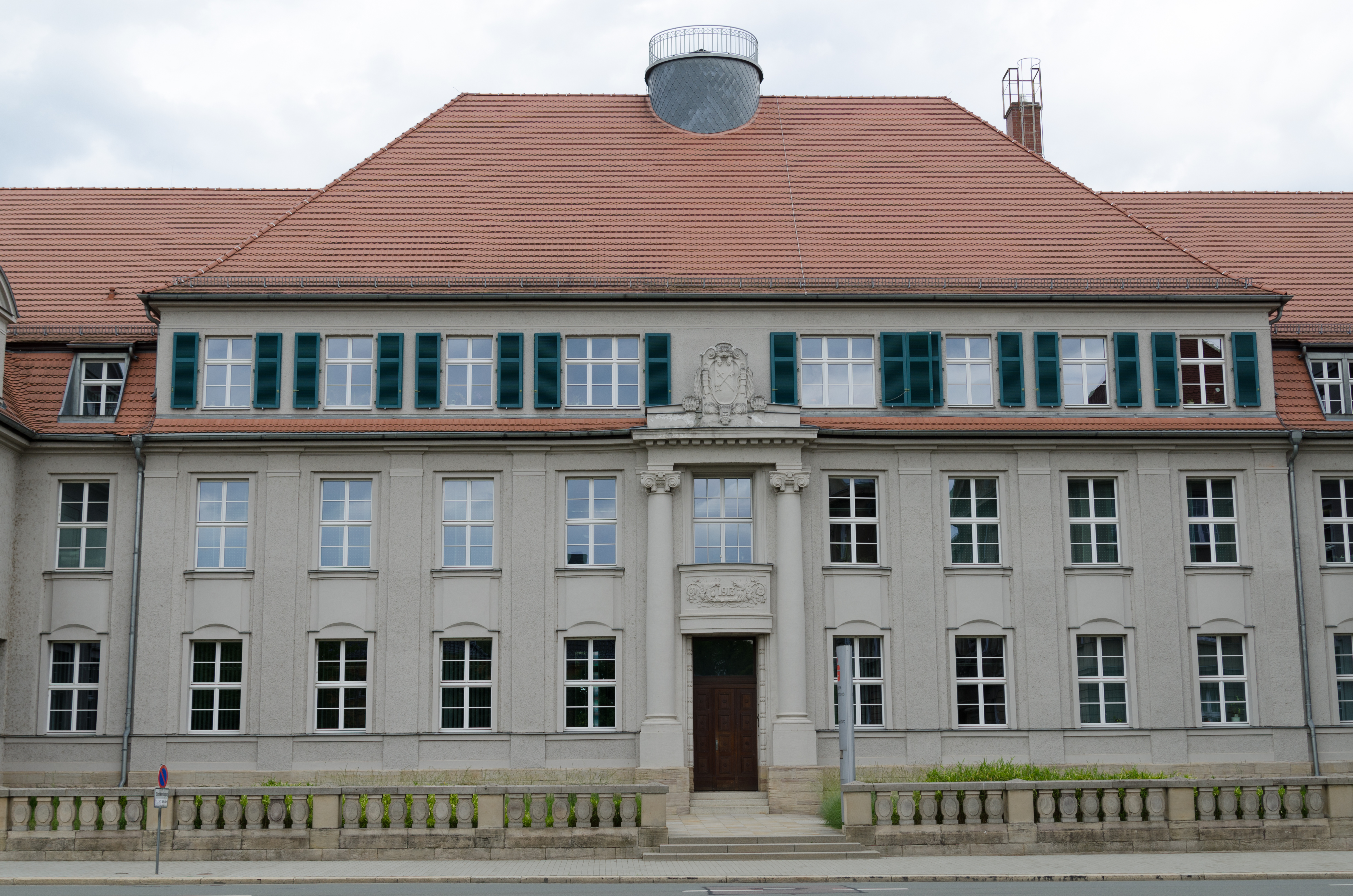 Zeitz, Albrechtstraße 24